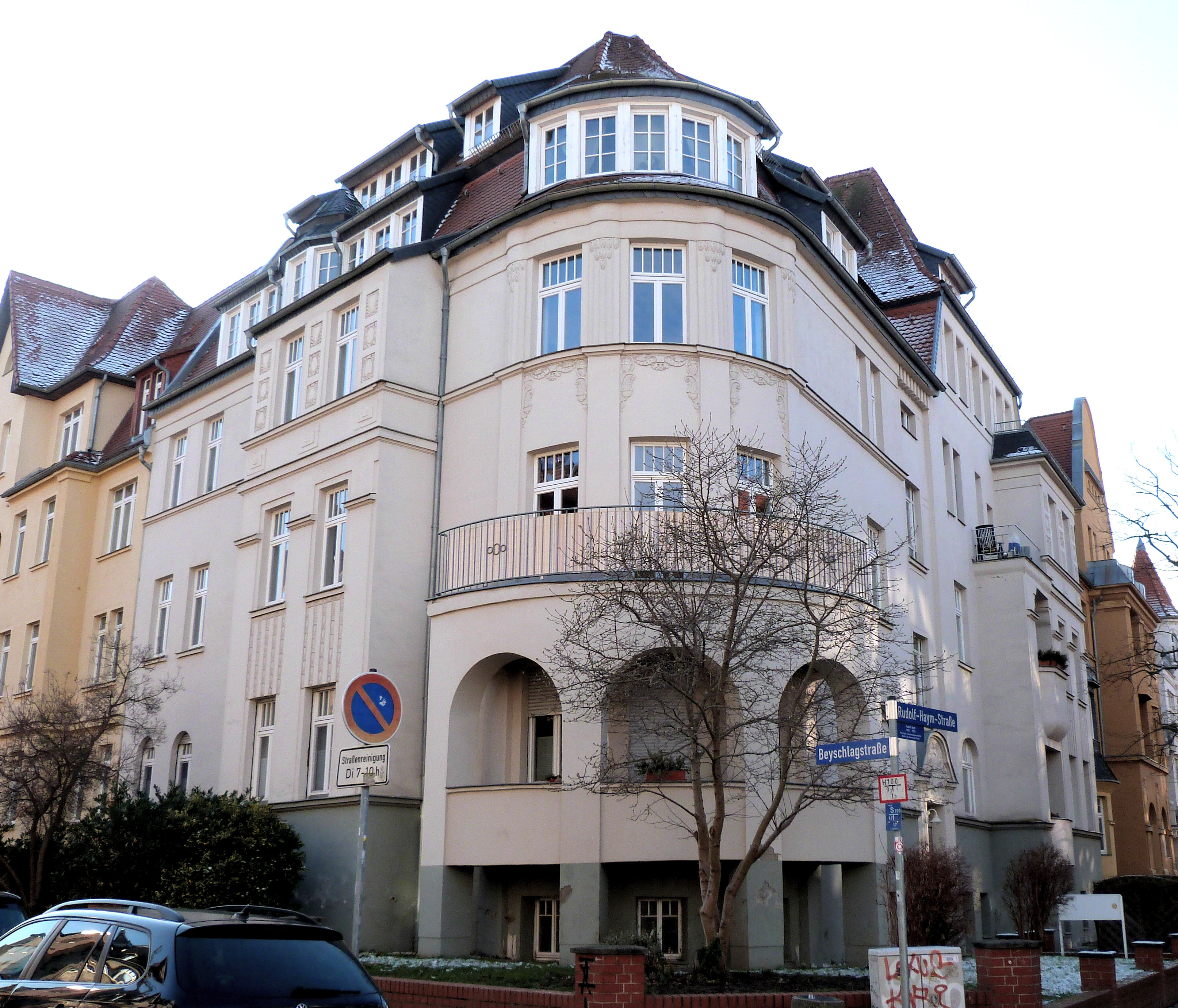 Rudolf-Haym-Straße 15, Halle (Saale)